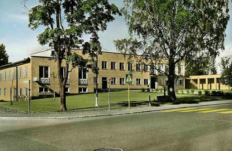 Kommunalkontoret i Hällefors, arkitekt Dag och Britta Ribbing